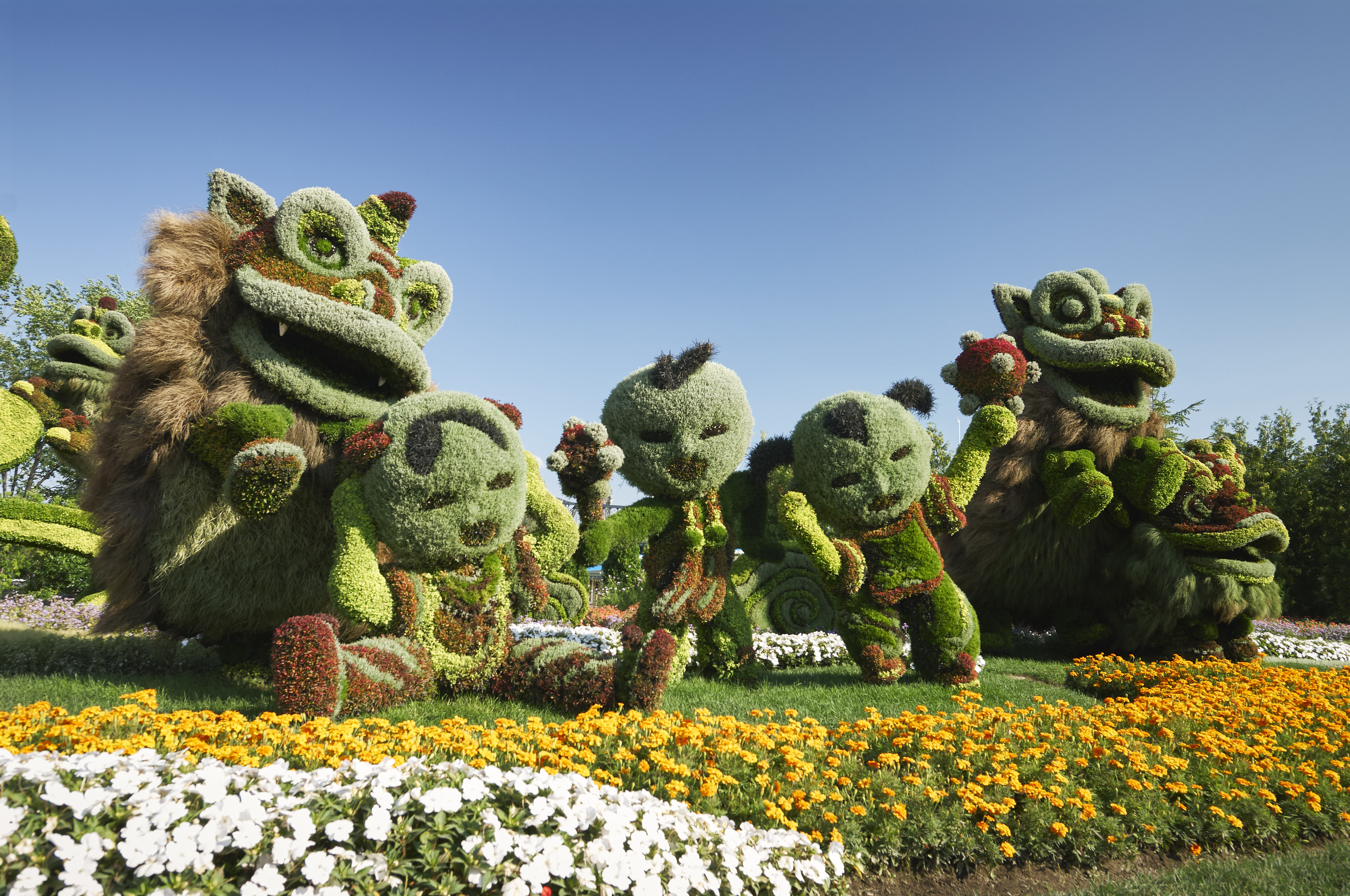 Les Neuf Lions à Gatineau